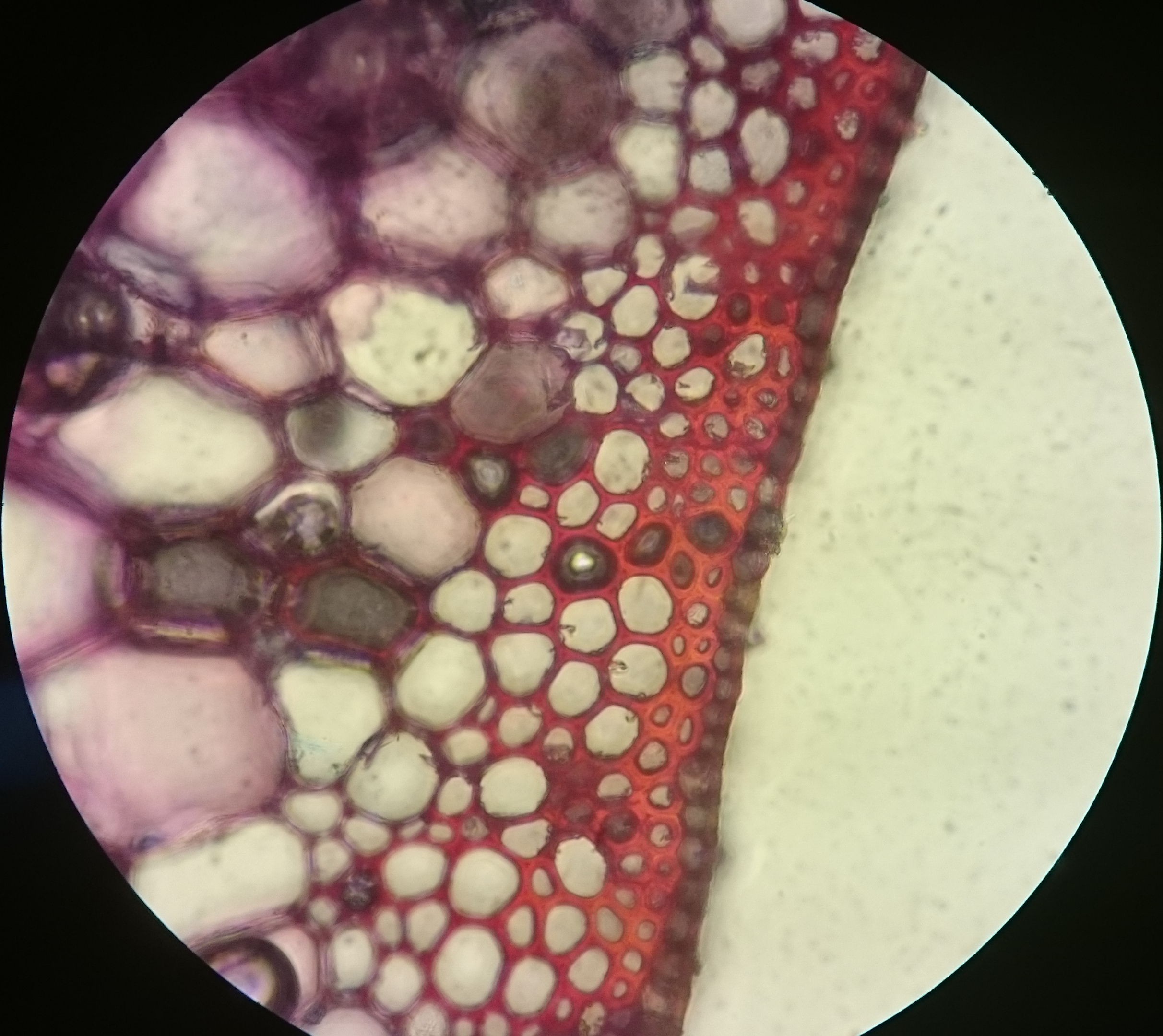 Sklerenchym des Zuckerrohrs (angefärbt)